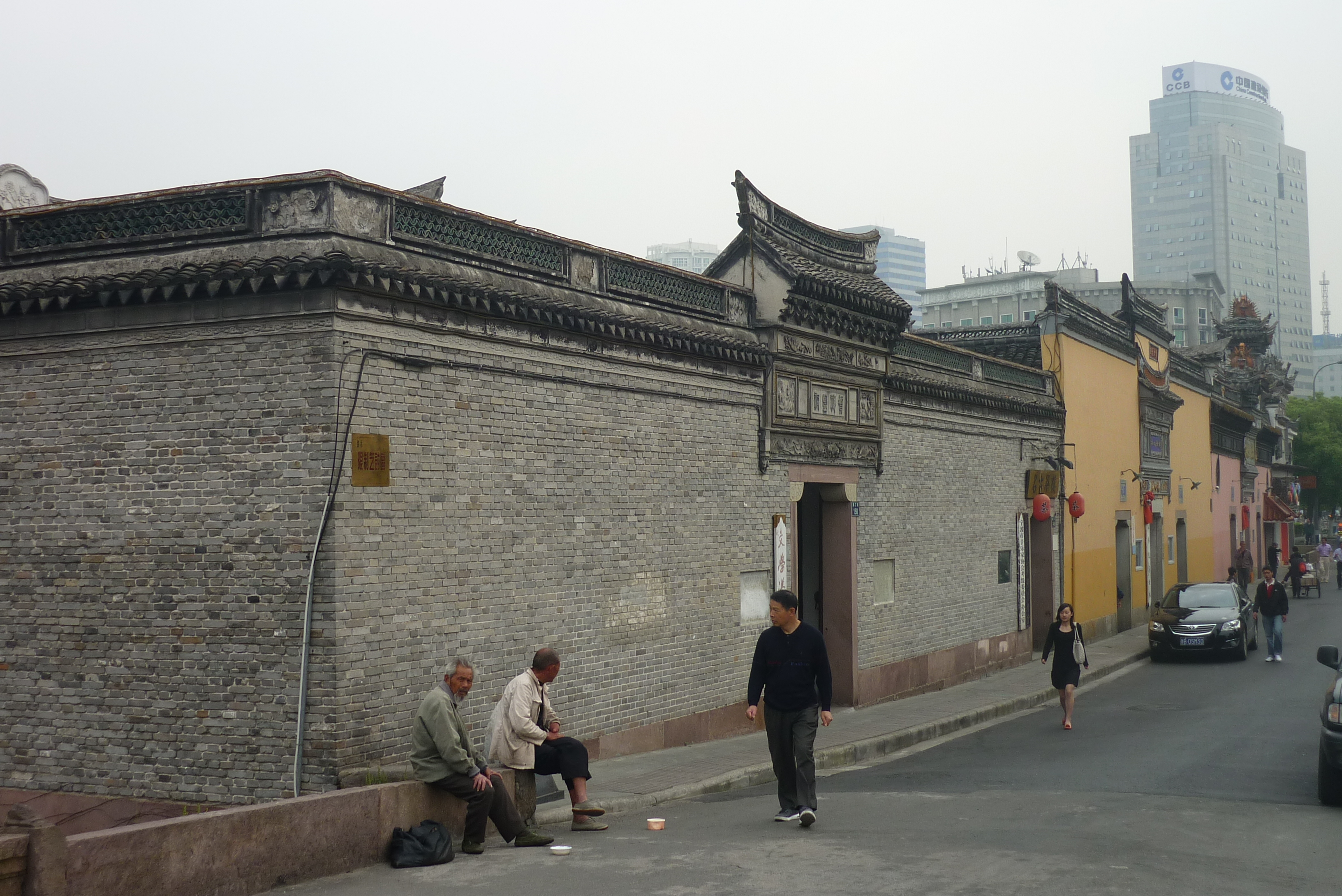 宁波月湖贺秘监祠